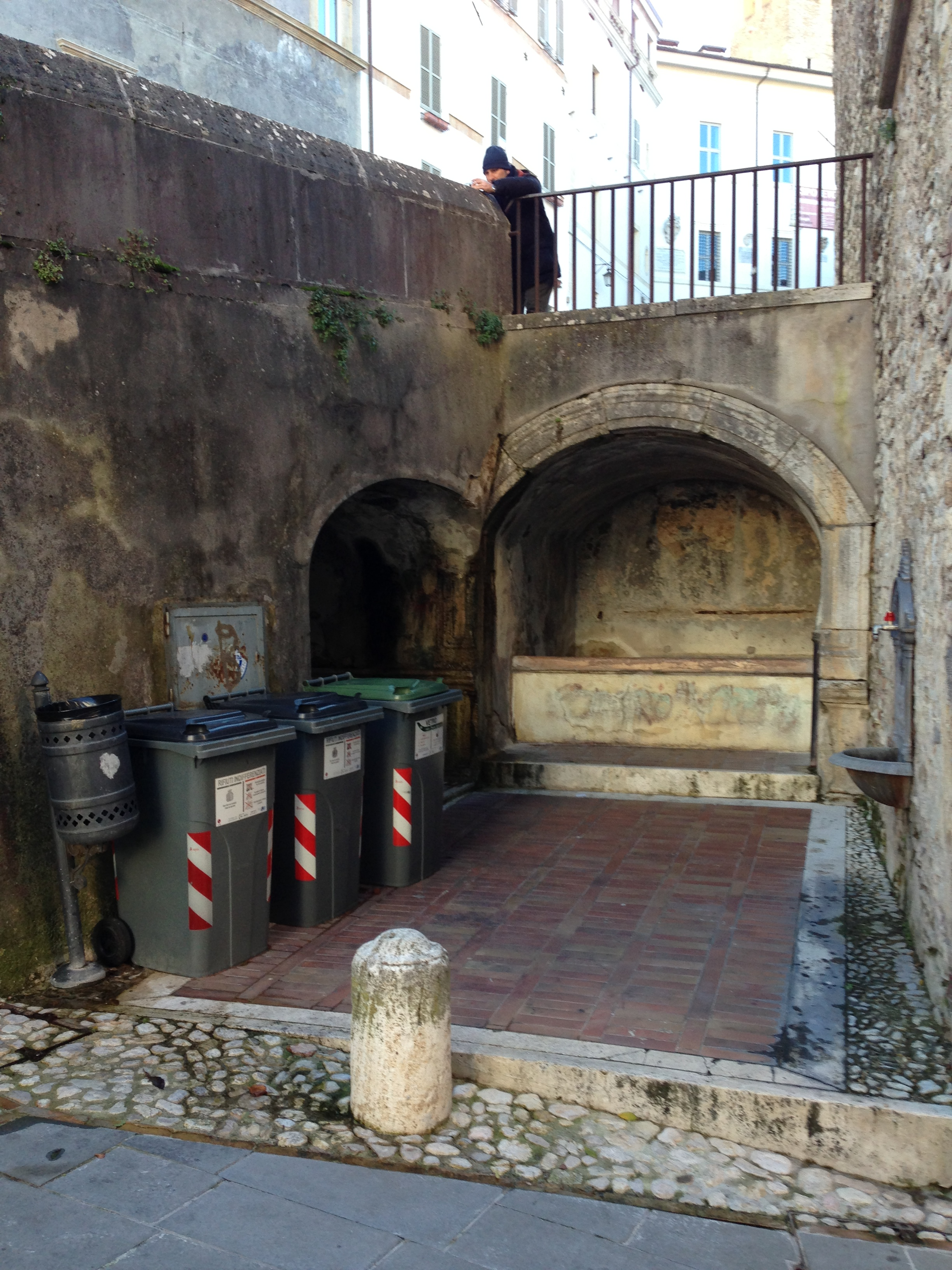 Lavatoio piazza Duomo. Spoleto